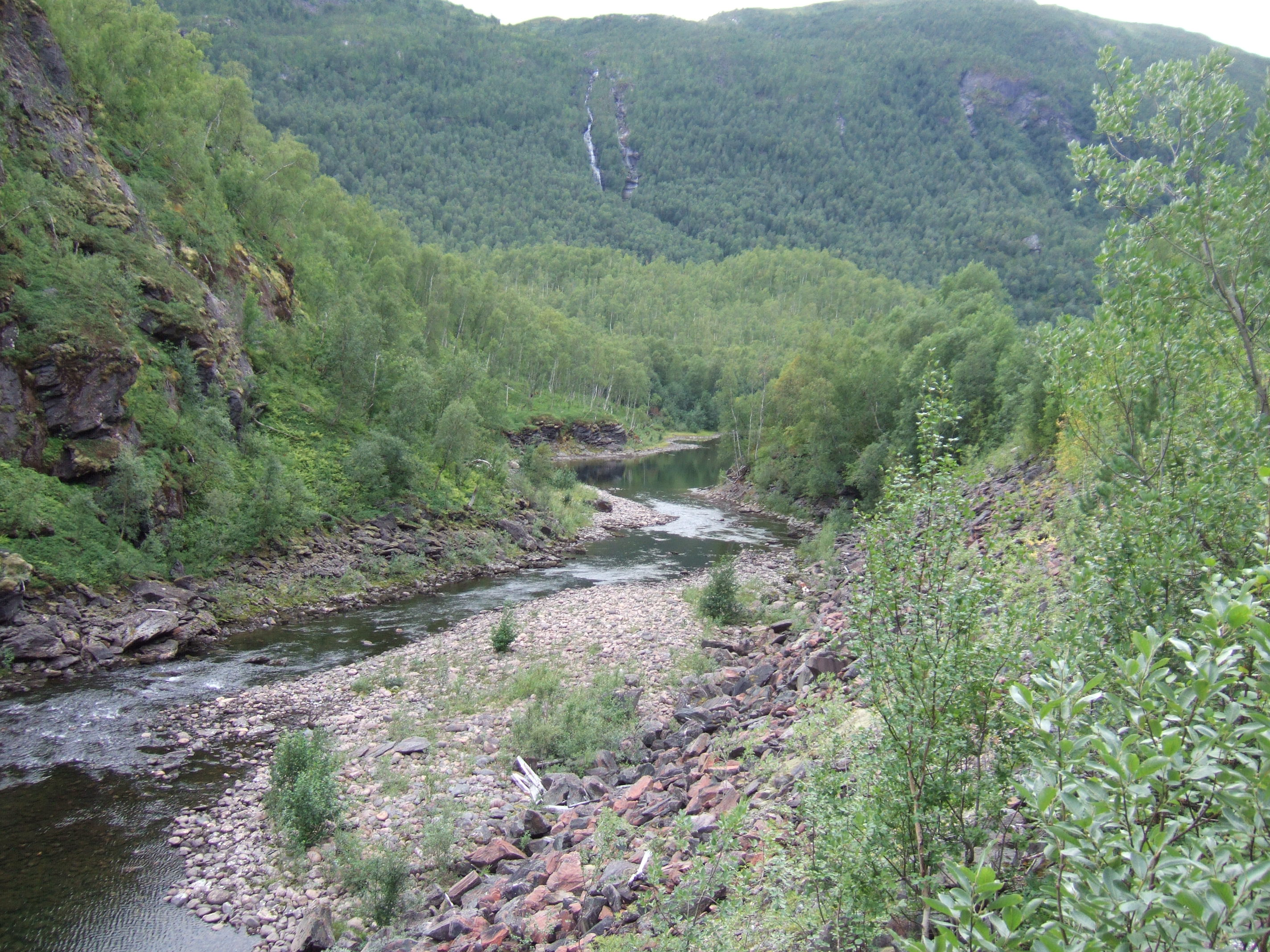 Sjønståelva i Sulitjelmavassdraget i Fauske kommune i Nordland.